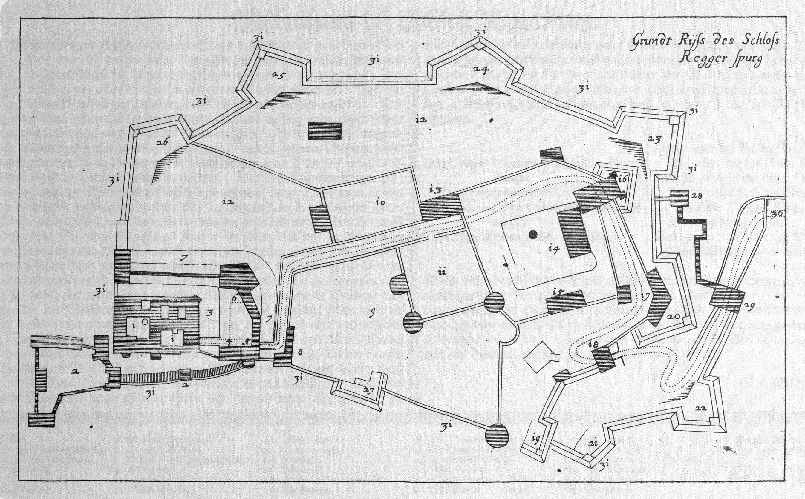 G. M. Vischers Käyserlichen Geographi, Topographia Ducatus Stiriae, Das ist: Eigentliche Delineation / und Abbildung aller Städte / Schlösser / Marcktfleck / Lustgärten / Probsteyen / Stiffter / Clöster und Kirchen / so es sich im Herzogthumb Steyrmarck befinden; Und anjetzo Umb einen billichen Preyß zu finden seynd Bey Johann Bitsch Universitäts Buchhandlern / Auff dem Juden=Platz bey der guldenen Saulen. Graz 1681 Die Nummerierung der Dateien folgt der alphabetischen Reihung der Ortsnamen und entspricht nicht dem Vischer-Register